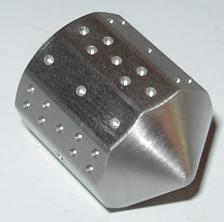 12-sided steel D12.